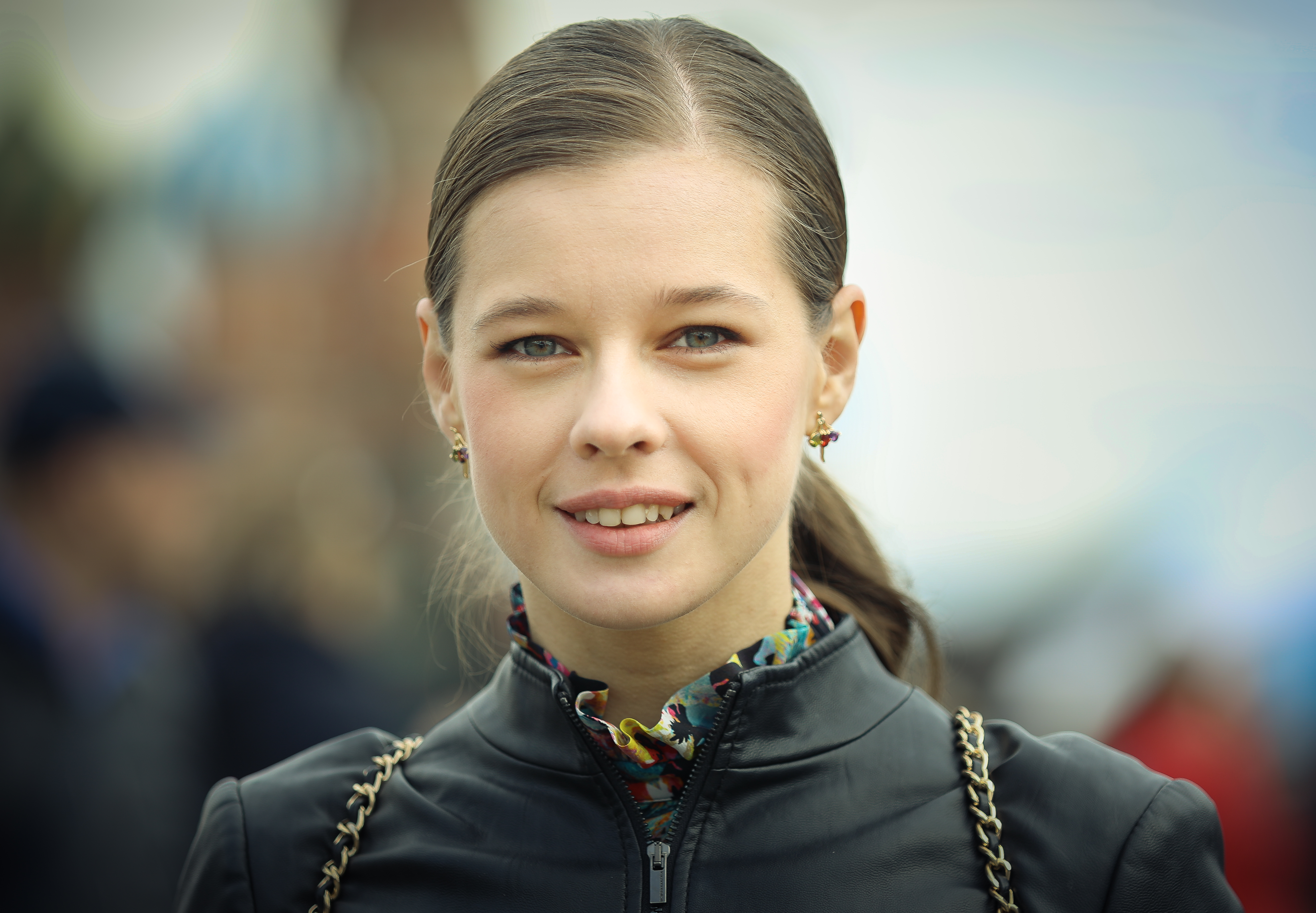 Екатерина Шпица (актриса) на книжном фестивале "Красная площадь"-2017.